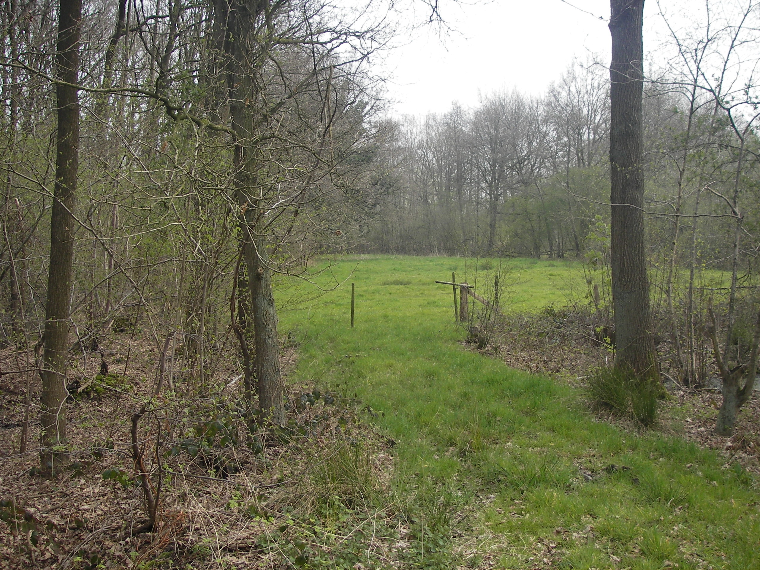 Kleinschalig landschap in de Mortelen bij Oirschot